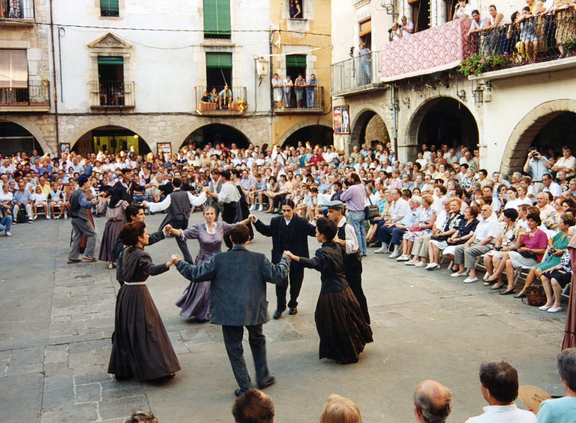 Exemple de contrapàs